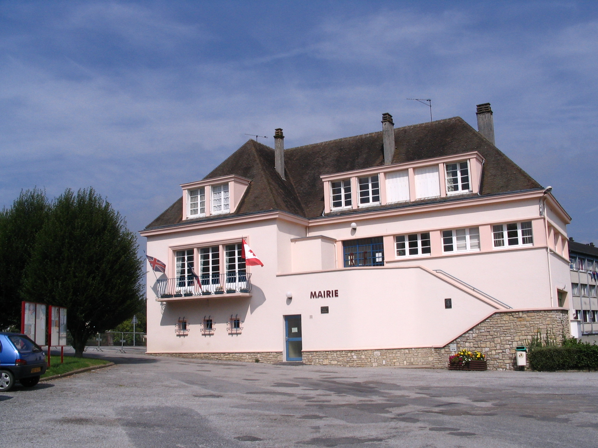 Mairie de Sainte-Gauburge-Sainte-Colombe, Orne, France